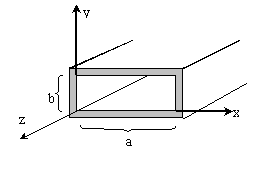 Ուղղանկյուն մետաղյա ալիքատար